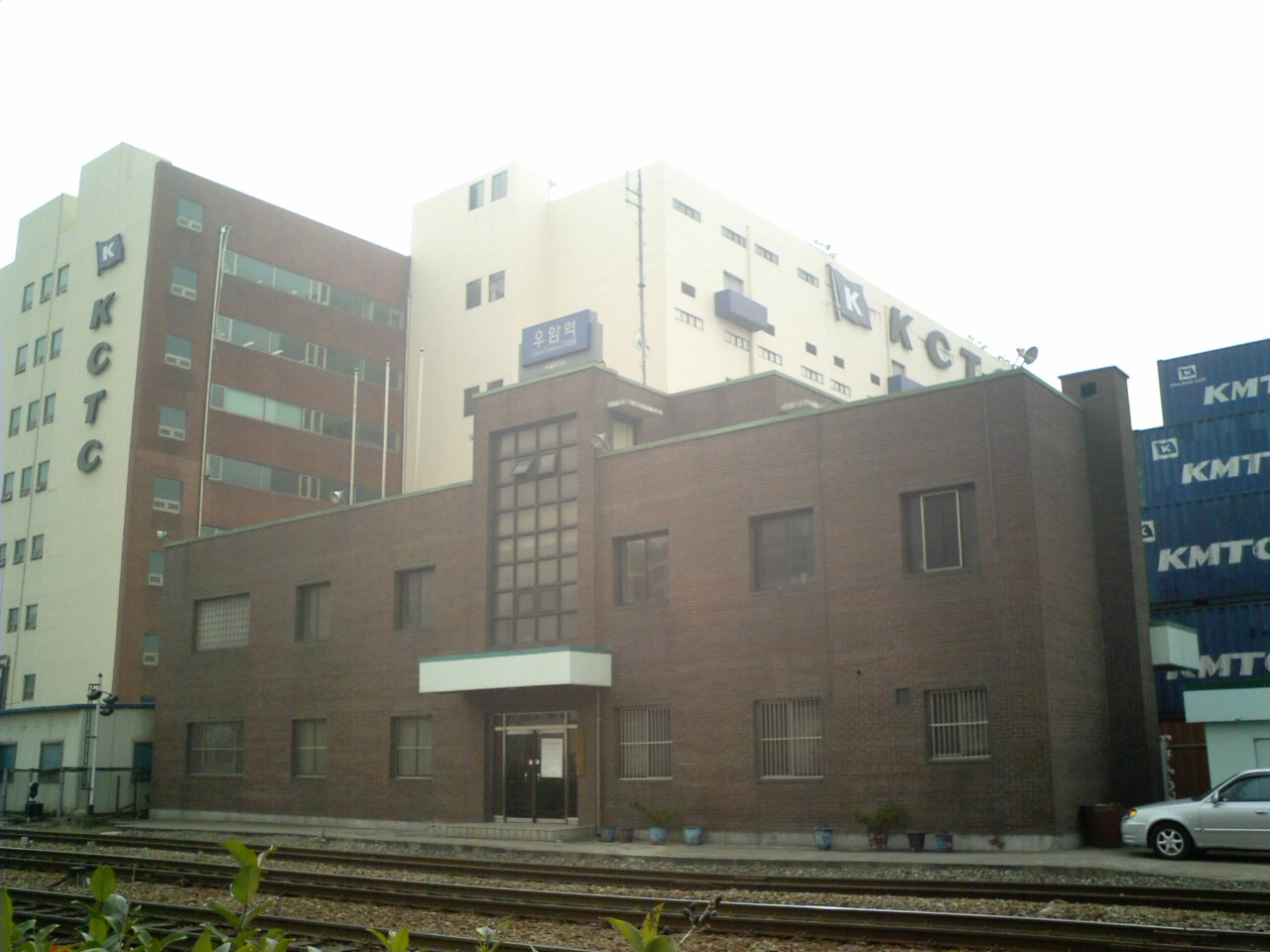 우암선 우암역